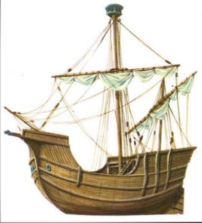 Imagem de um barinel português de finais do século XIV, inícios de século XV